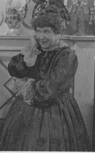 Herminia Mancini.- actress